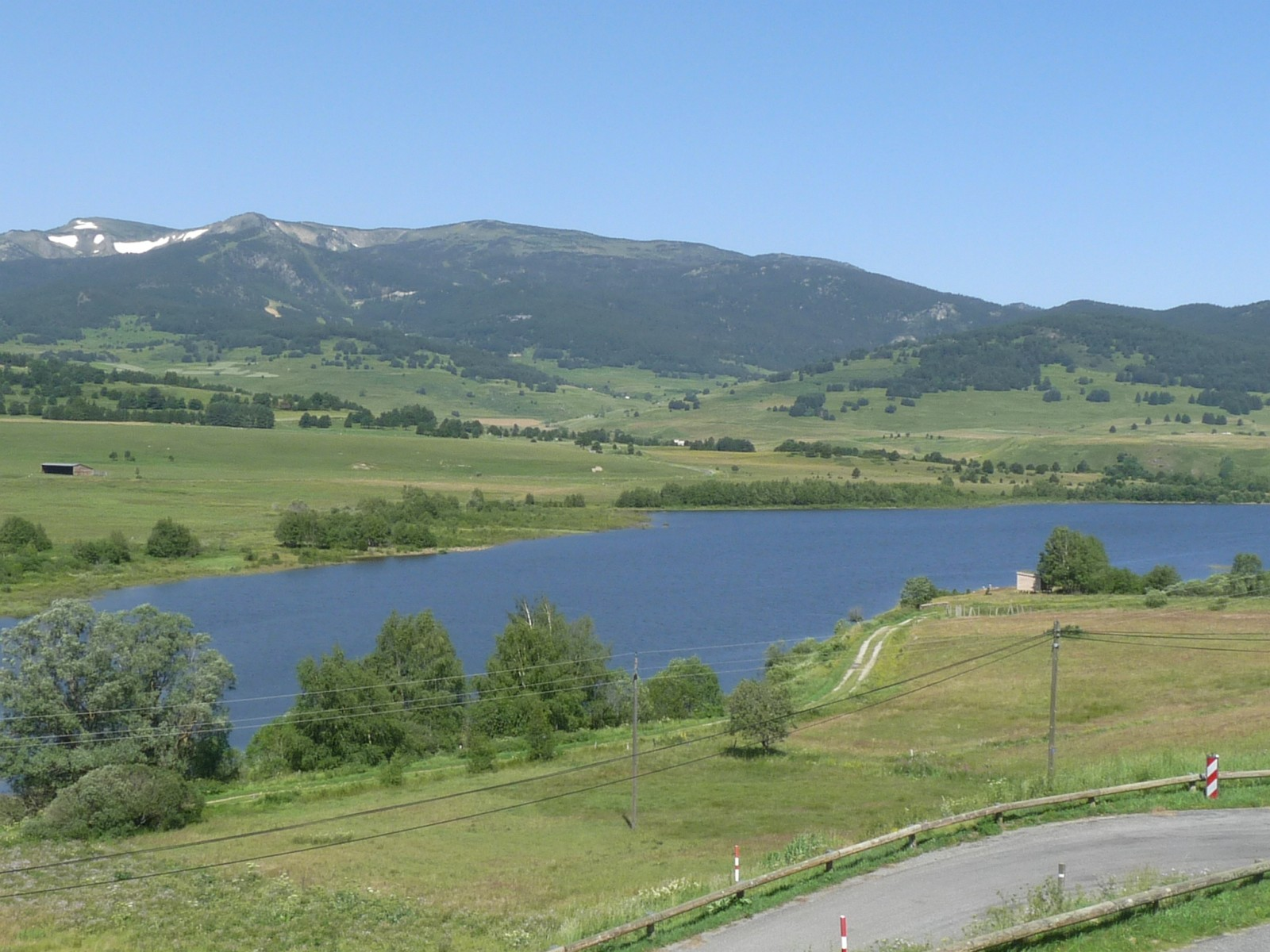 Lac de Puyvalador vu de l'église de Réal, Pyrénées-Orientales, France